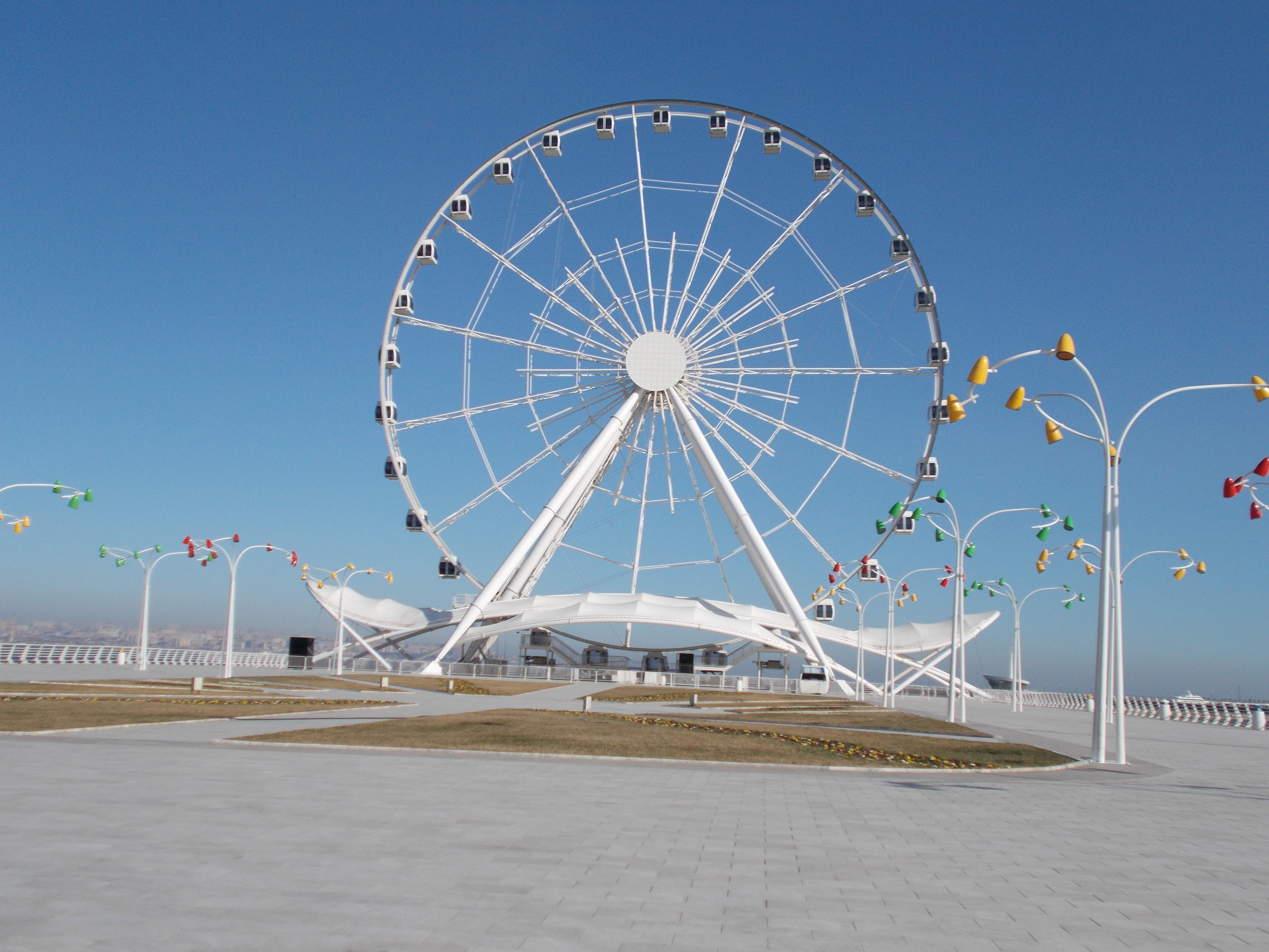 Dənizkənarı bulvar.Yeni bulvarda yerləşən Şeytan Çarxı adlı karusel.